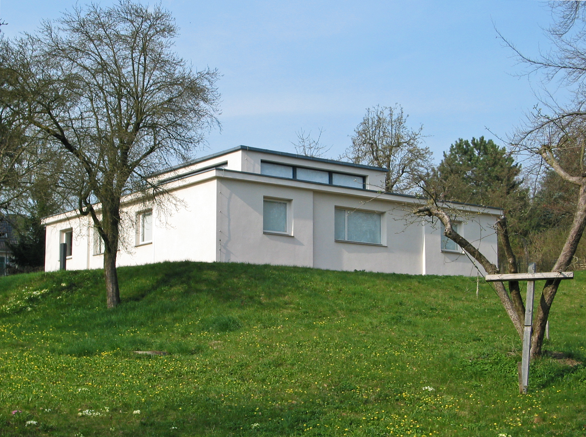 Das Haus am Horn in Weimar (Südwestansicht).